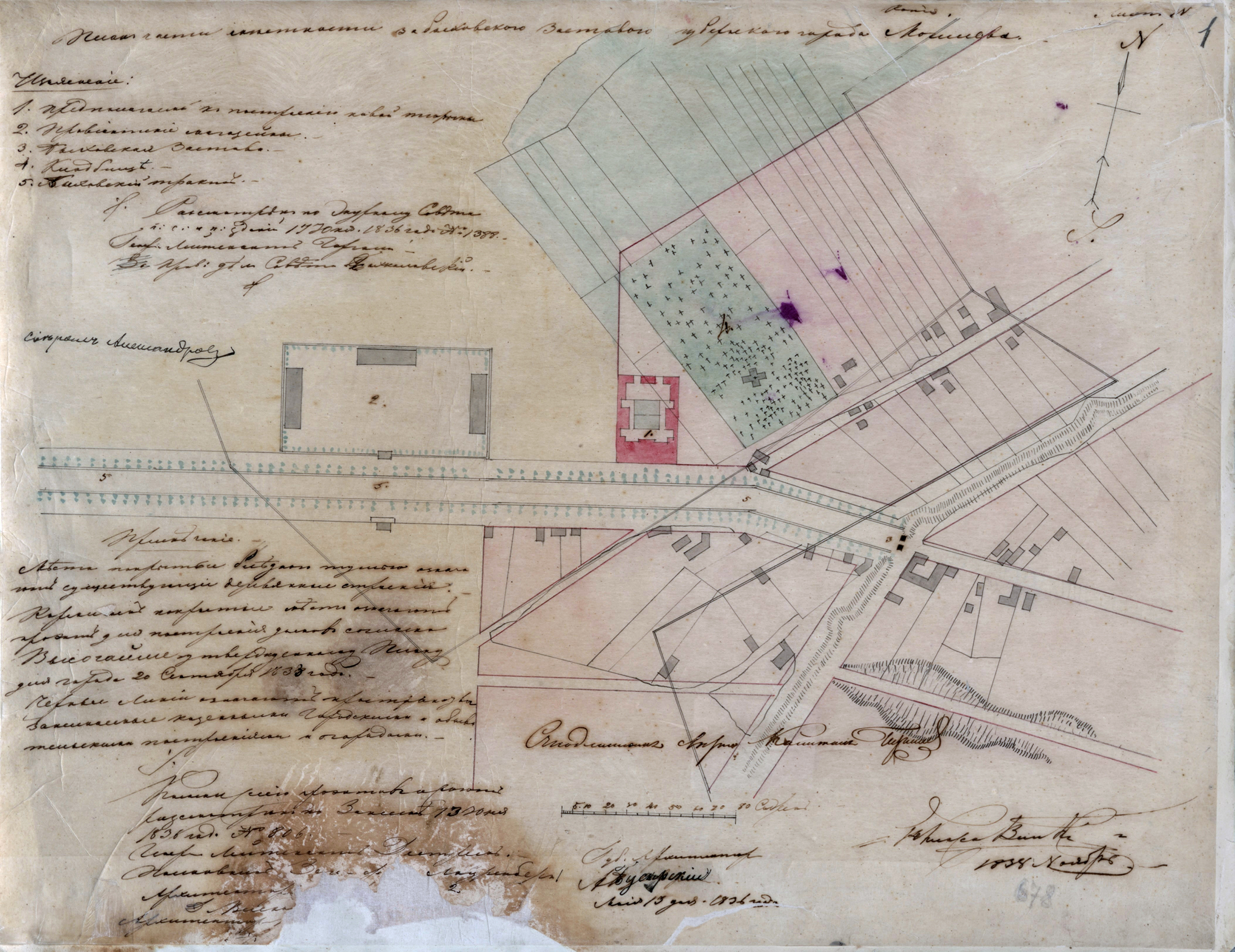 Беларуская (тарашкевіца): Магілёў (Магілёў). Плян мясцовасьці за Быхаўскай заставай (Bychaŭskaja)